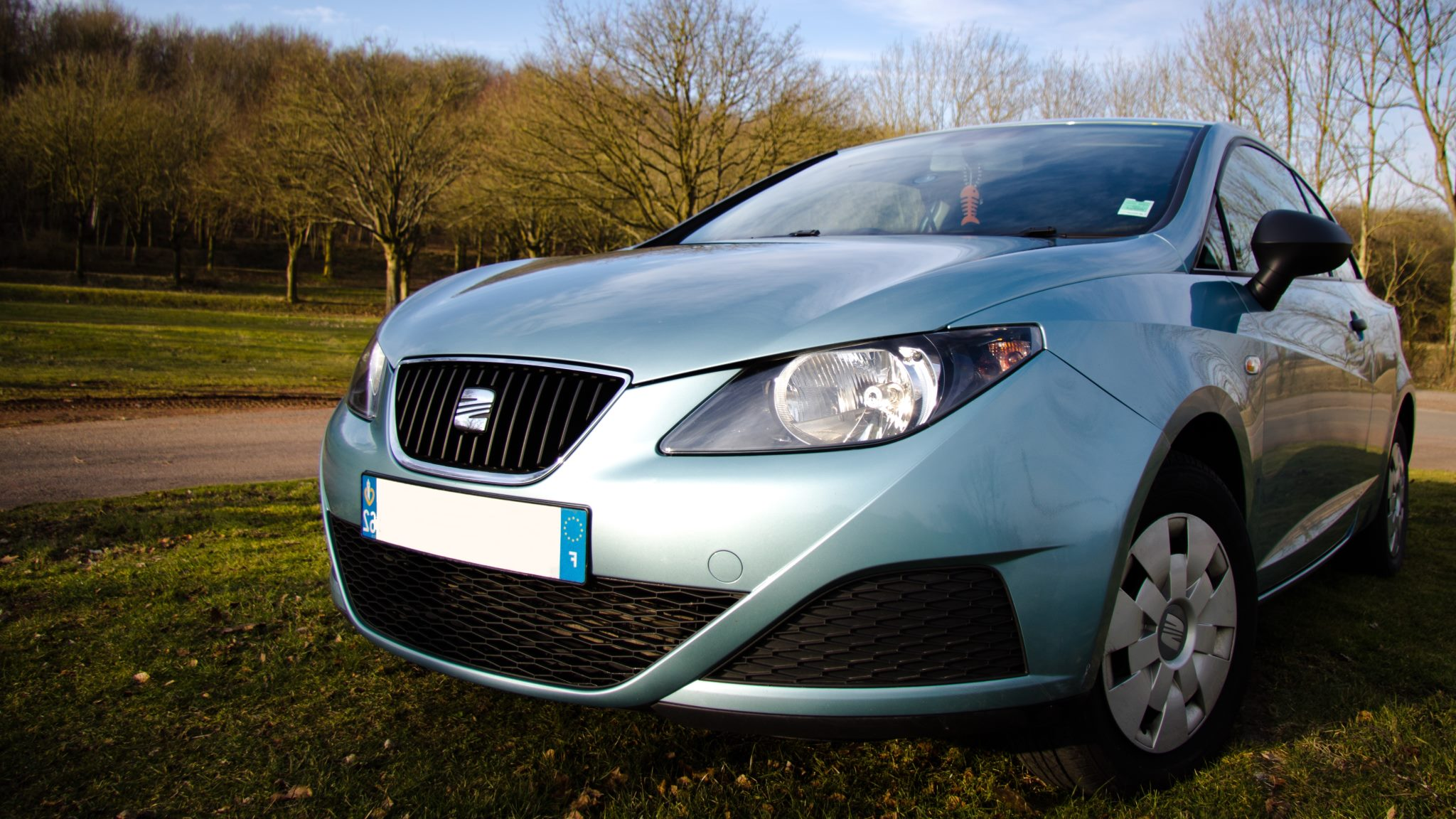 Seat Ibiza 5